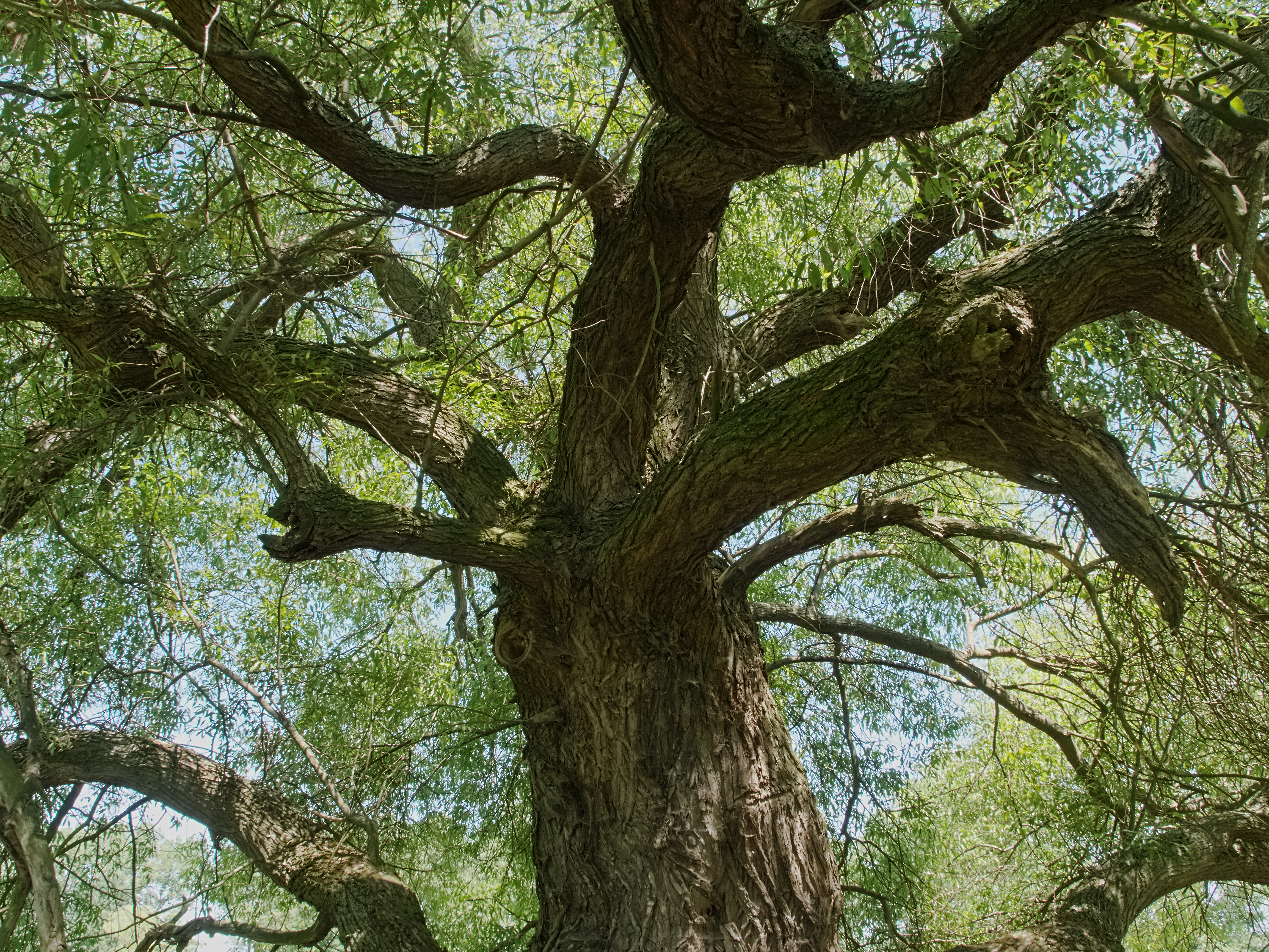 Bruch-Weide oder Knack-Weide - Salix fragilis. Aufgenommen an der Mulde in Eilenburg, Sachsen, Deutschland.